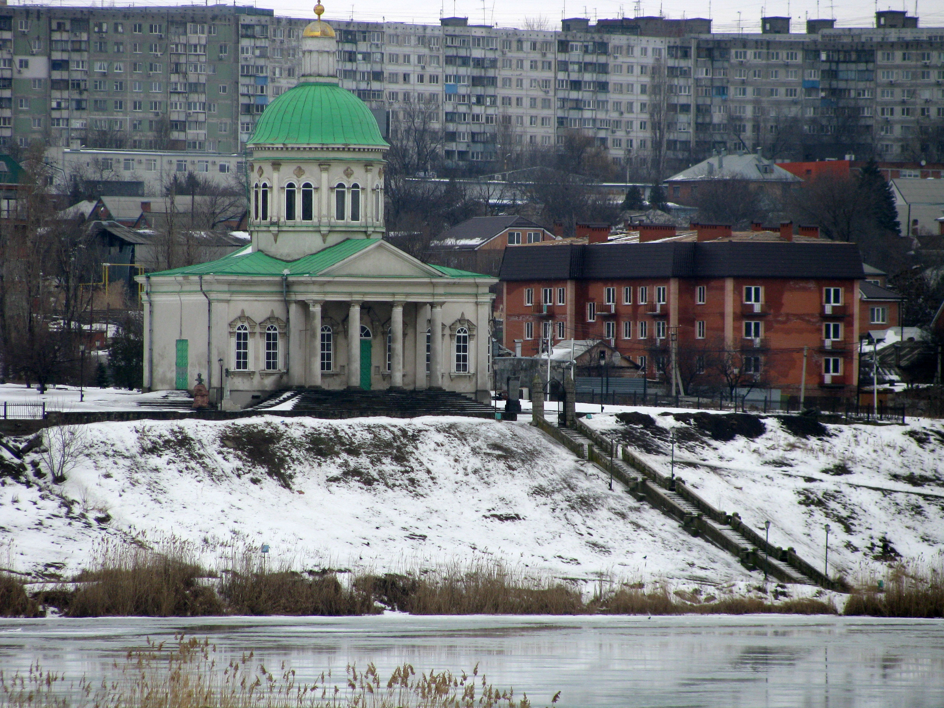 Вид с моста на Сурбхач